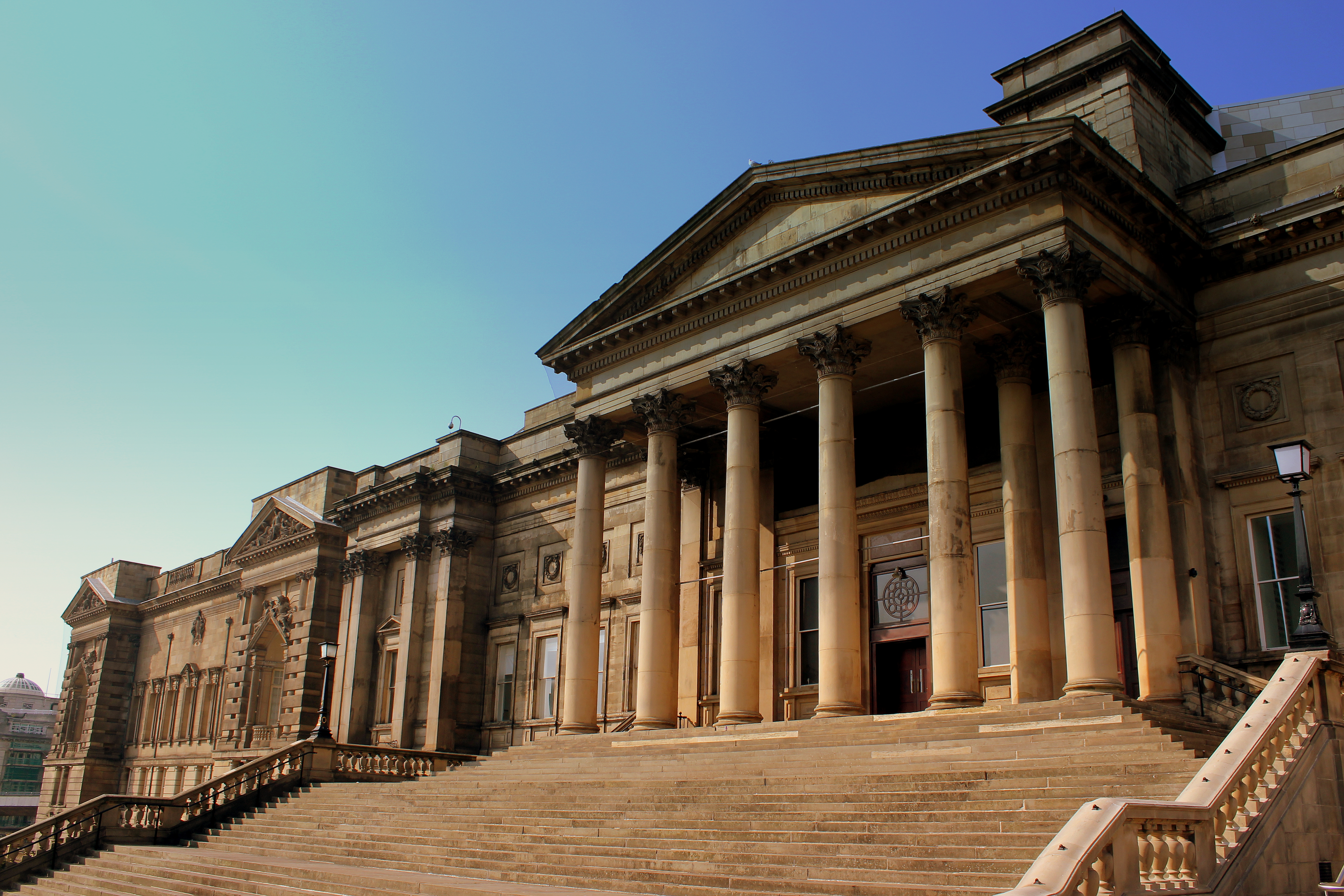 WORLD MUSEUM WILLIAM BROWN STREET LIVERPOOL AUG 2013